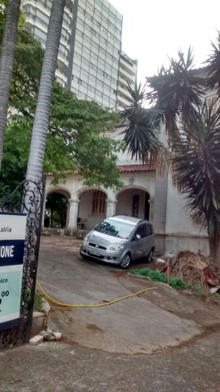 Fachada da casa da rua Cardoso de Almeida